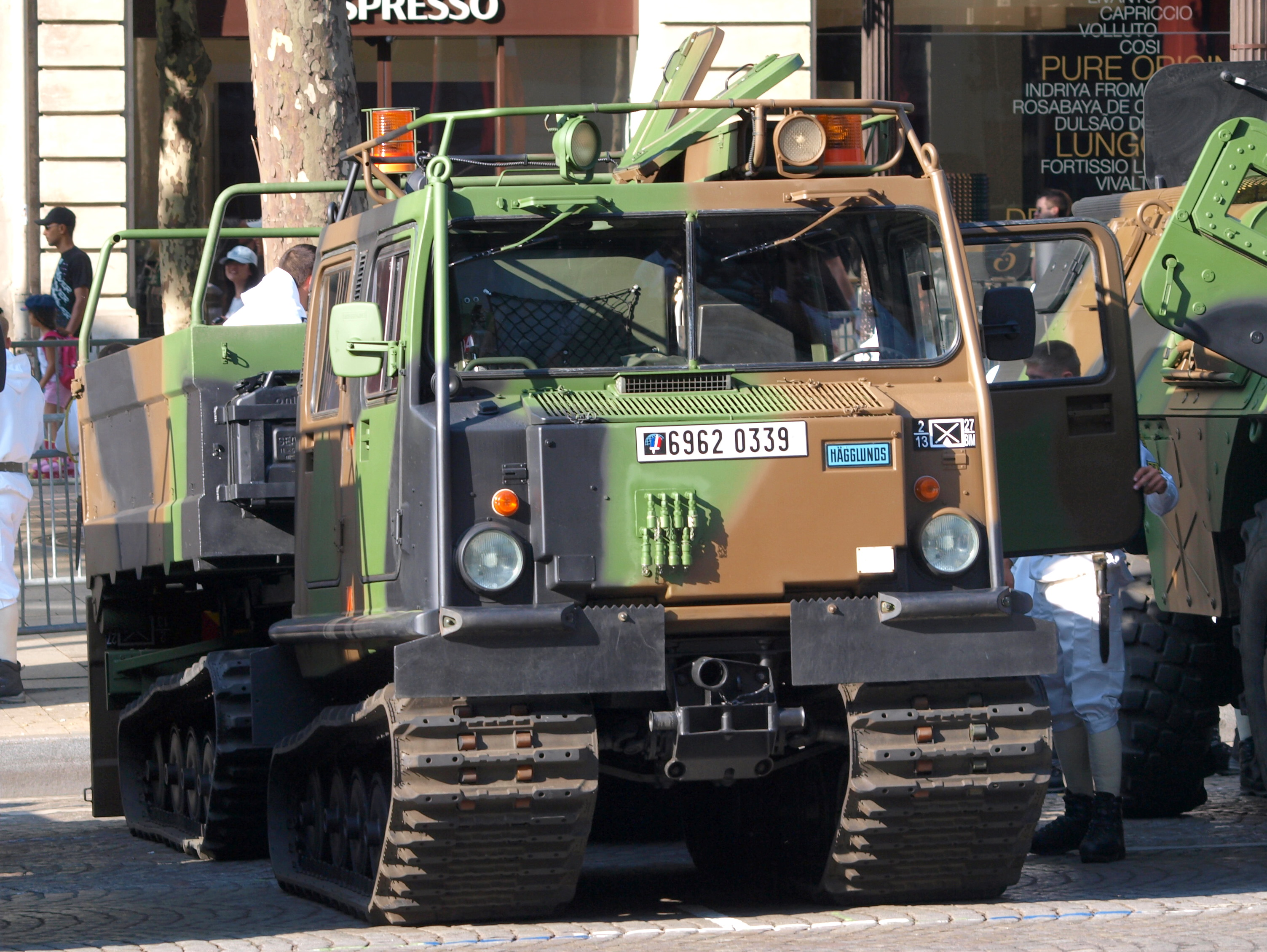 VHM-1, (Véhicule haute mobilité), 13e bataillon de chasseurs alpins, French army licence registration '6932 0993'